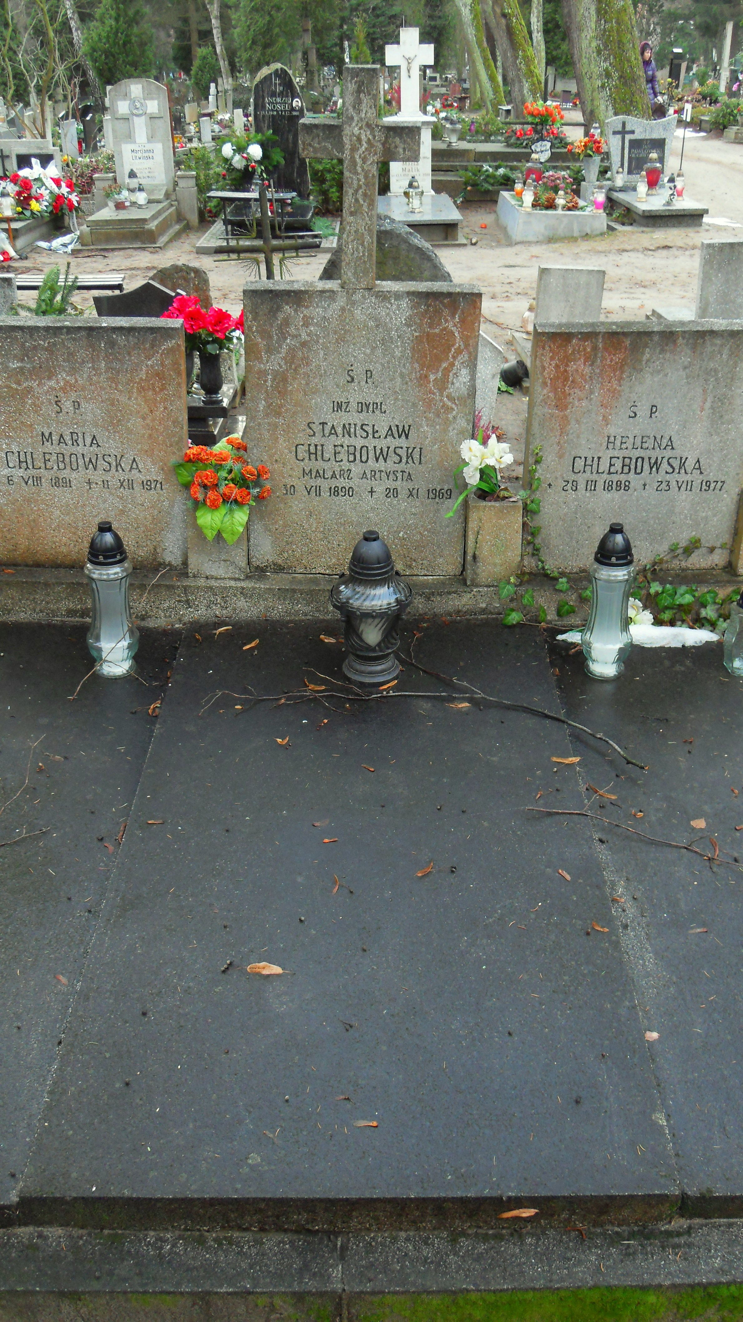 Gdańsk Oliwa. Cmentarz Oliwski, grób malarza Stanisława Chlebowskiego (1890-1969).